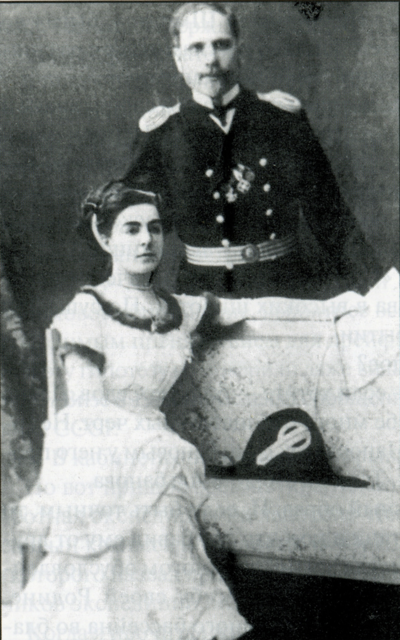 Венчальное фото Седова с женой